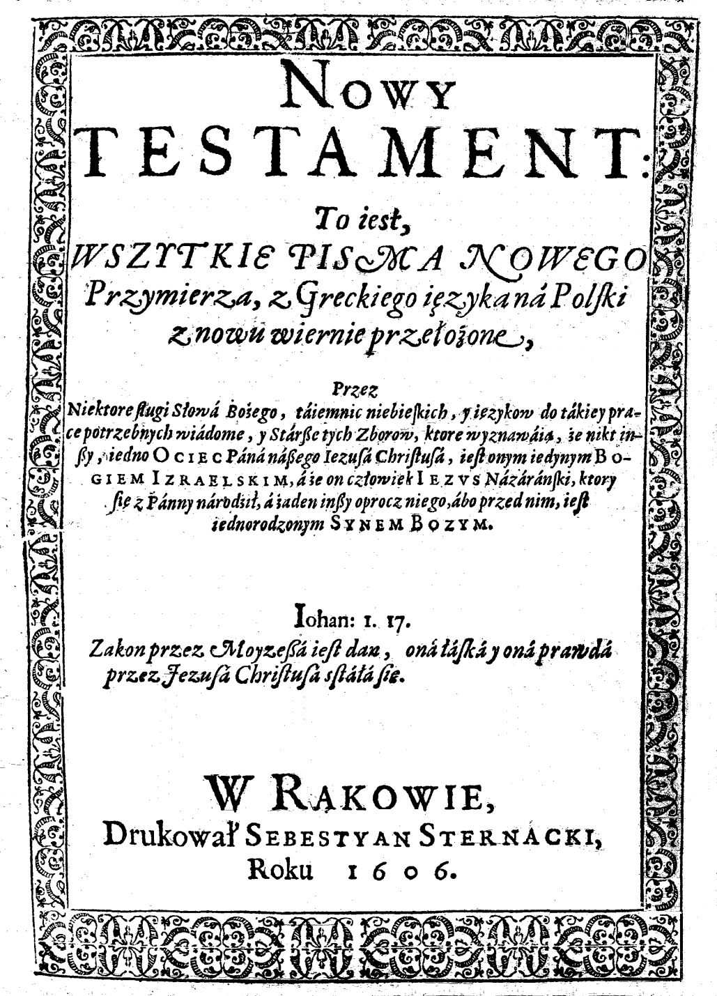 Nowy Testament rakowiecki (1606)